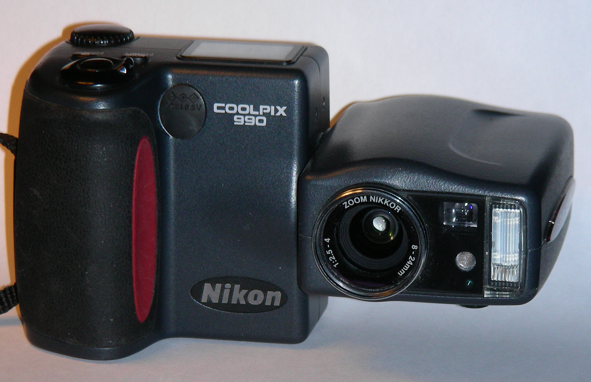 Nikon Coolpix model 990